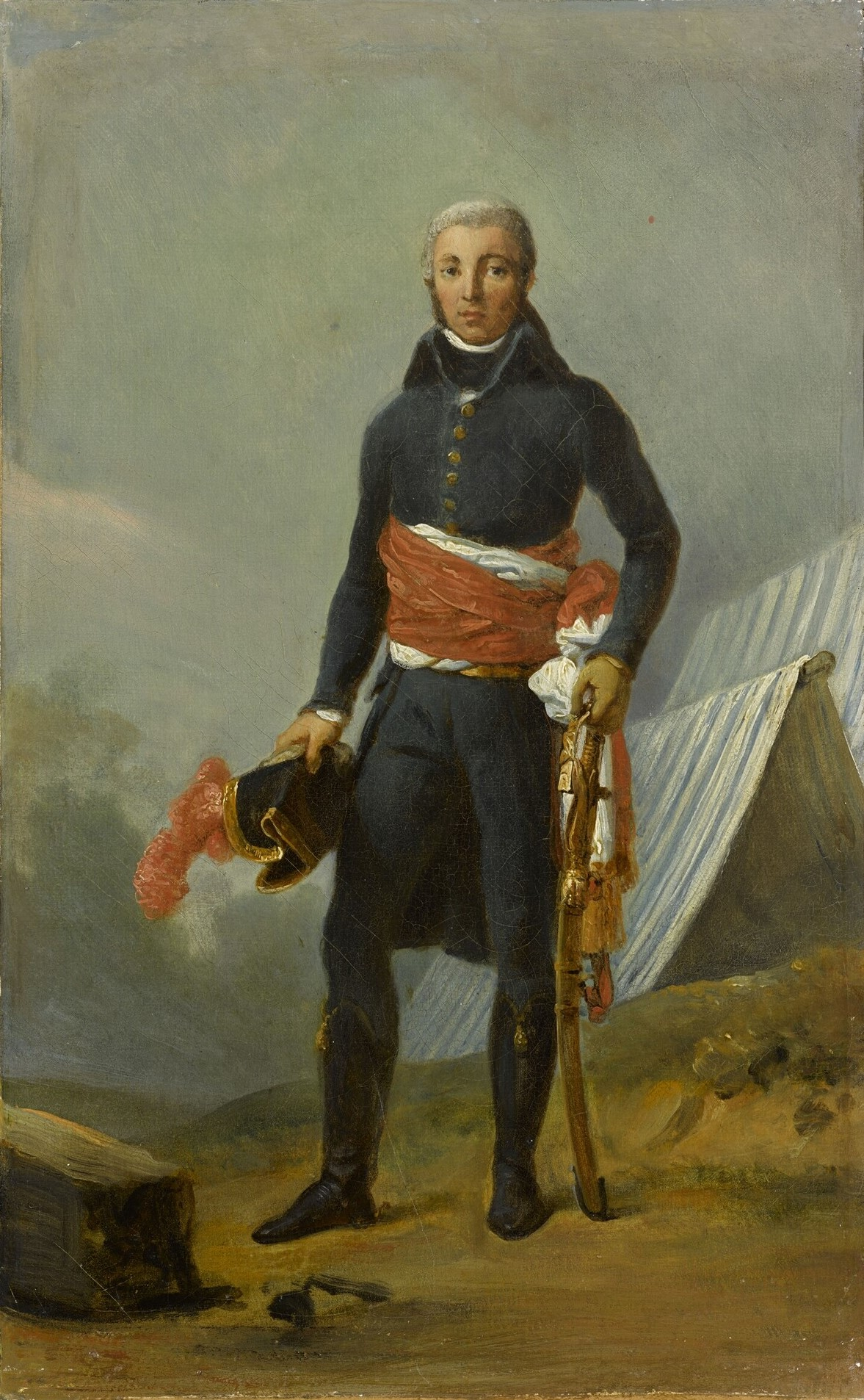 Jean Victor Moreau, général (1764-1813))